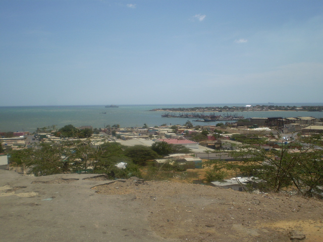 Vista a Las Piedras.